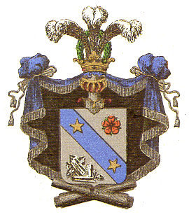 Vaakuna